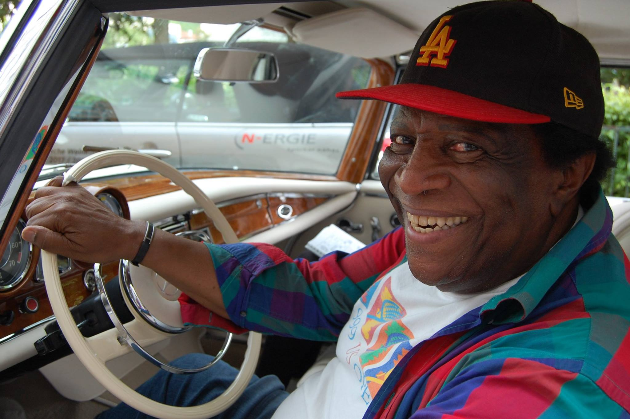 Roberto Blanco als Teilnehmer der Oldtimerrallye "ZF Sachs Franken Classic 2017" in Bad Kissingen